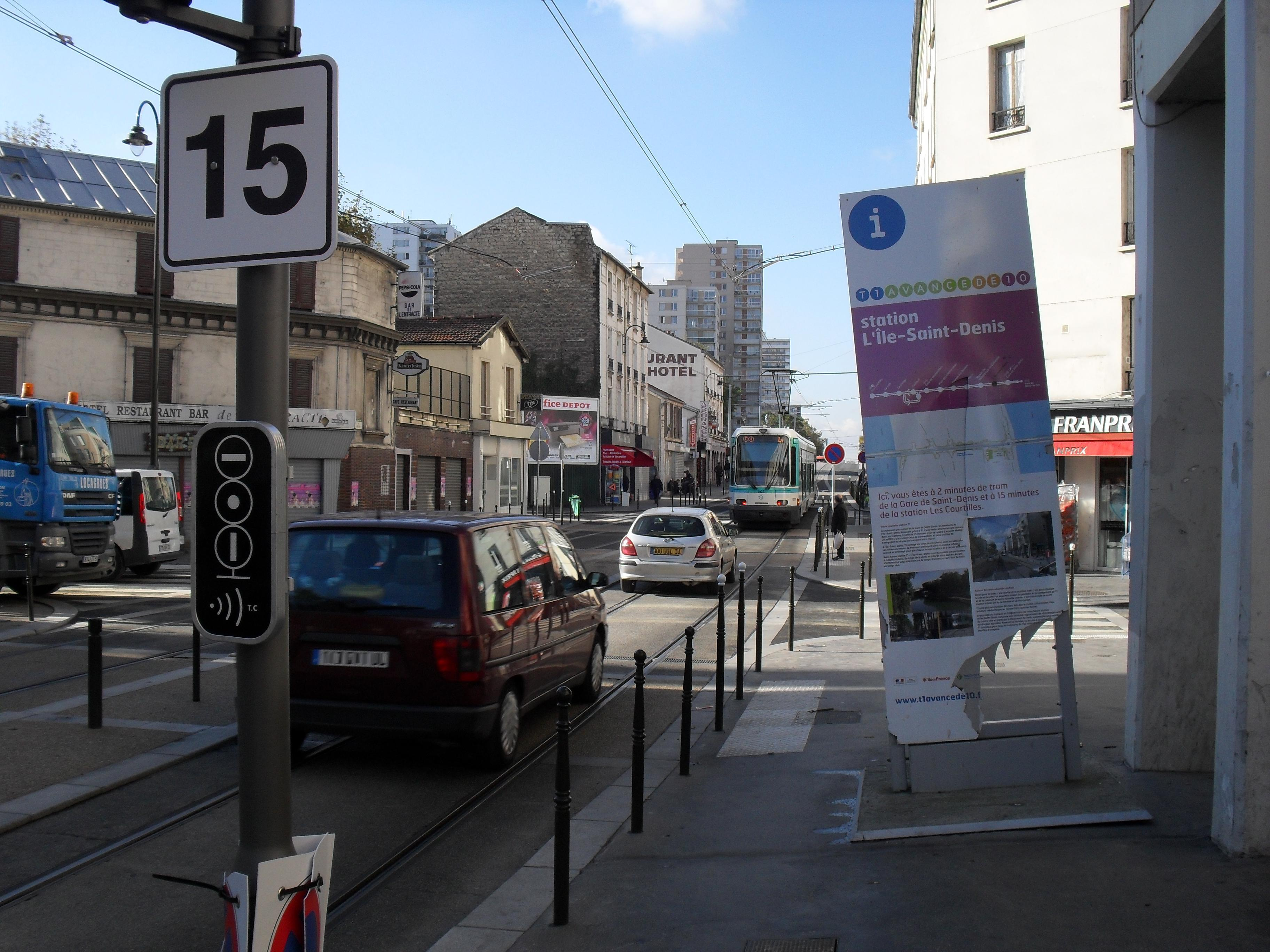 Paris Tramway ligne 1